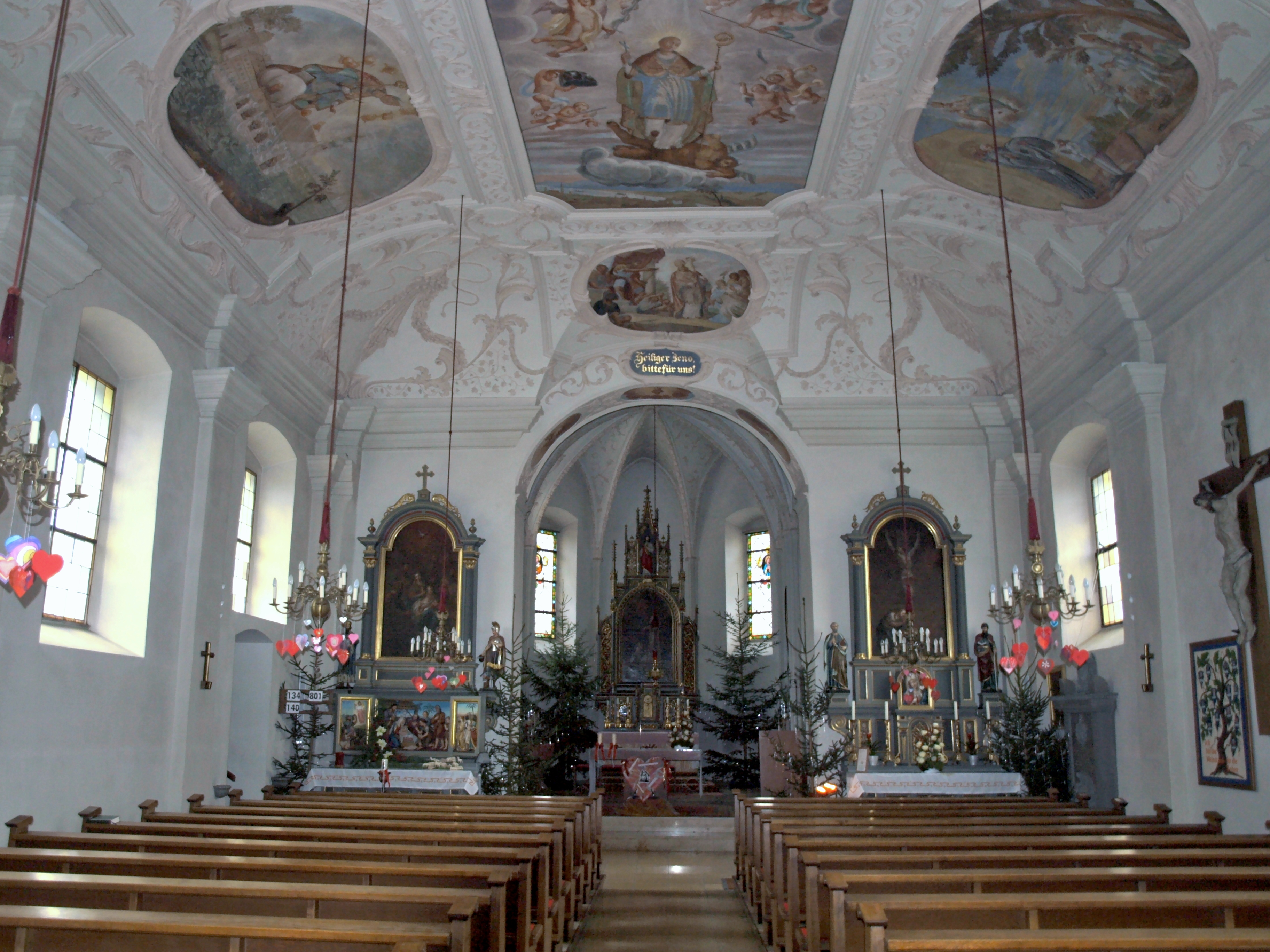 Kath. Pfarrkirche hl. Zeno und Friedhof